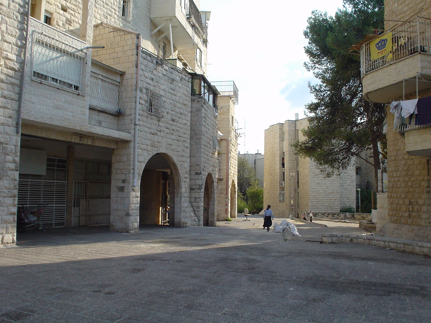 שכונת מעלות דפנה ירושלים